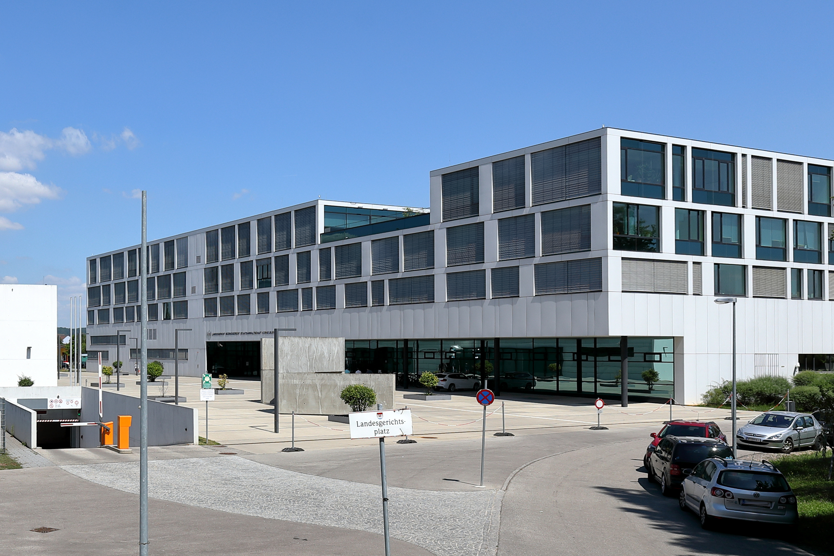 Das Landes- und Bezirksgericht in der niederösterreichischen Stadtgemeinde Korneuburg.Das Gerichtsgebäude ist Teil des Justizzentrums, das um 77 Mio. Euro nach Plänen der ARGE Dieter Mathoi Architekten ZT GmbH und der Architekturwerkstatt din a4 ZT GmbH errichtet und Ende 2012 eröffnet wurde. Das Gerichtsgebäude weist eine Nutzfläche von rund 16.900 m² auf. Die Justizanstalt, auf rund 18.000 m² Nutzfläche, ist für rund 250 Haftplätze konzipiert.